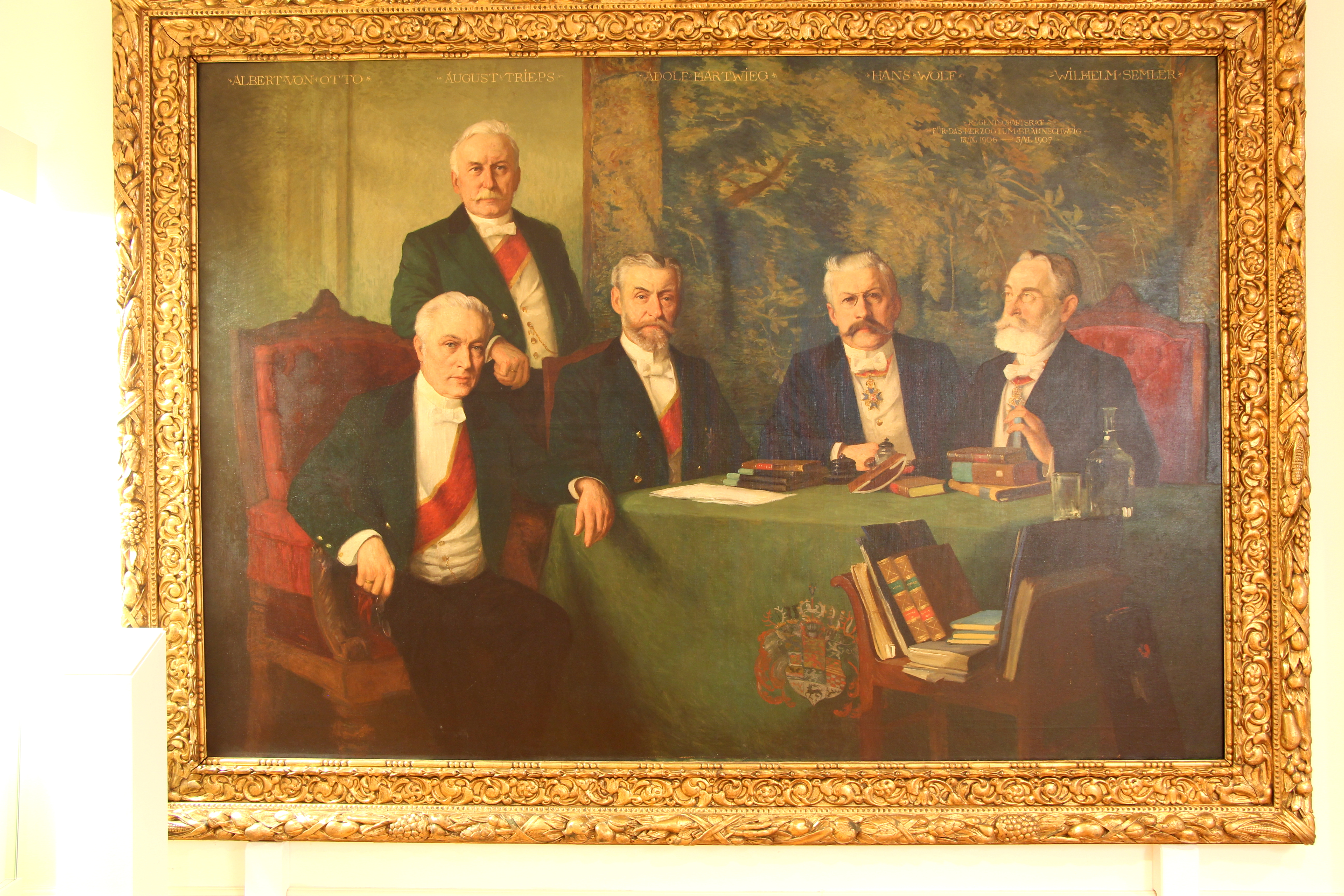 Braunschweigisches Landesmuseum. Wikimedia Deutschland. Juni 2014. Gemälde: Regentschaftsrat des Herzogtums Braunschweig 1906-1907. Öl auf Leinwand, Fritz Moritz Röbbecke, 1909. Albert von Otto, August Trieps, Adolph Hartwieg, Hans Wolf, Wilhelm Semler.